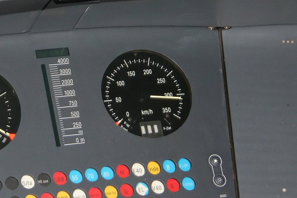 Tachometer eines ICE 3 bei einer Versuchsfahrt